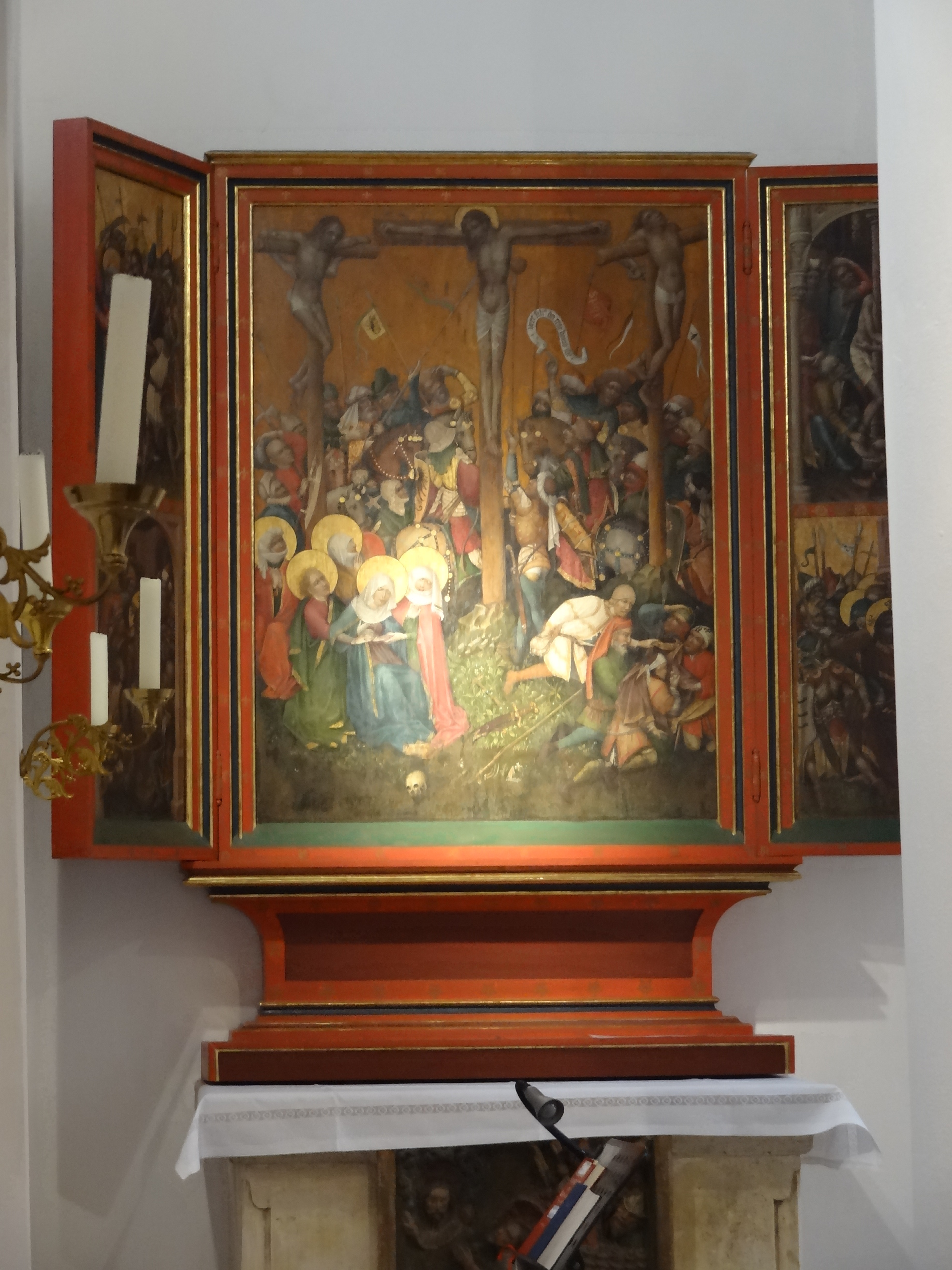 Gotischer Passionsaltar (um 1430/40) in der Filialkirche St. Leonhard in Regensburg